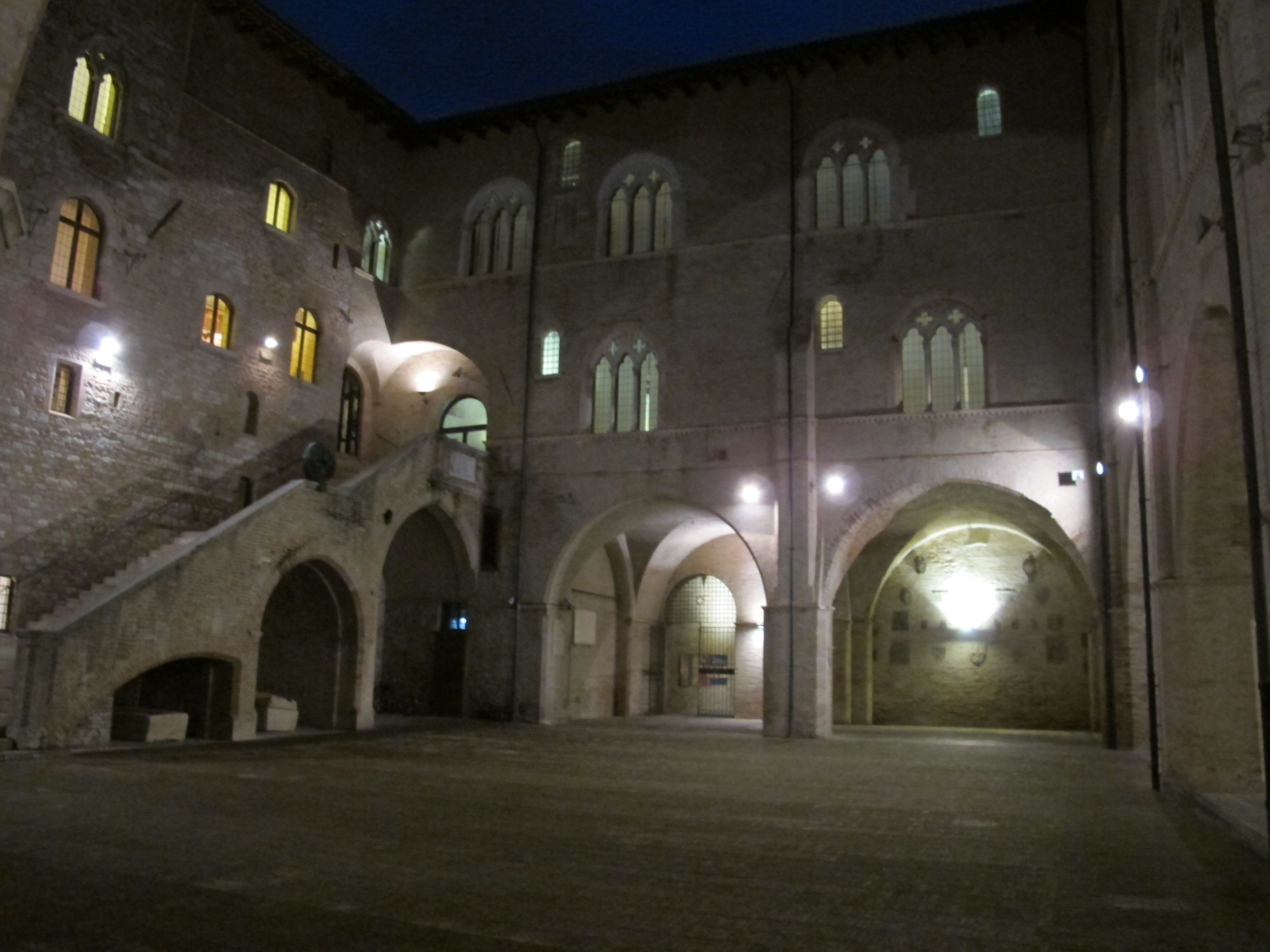 Palazzo trinci, cortile